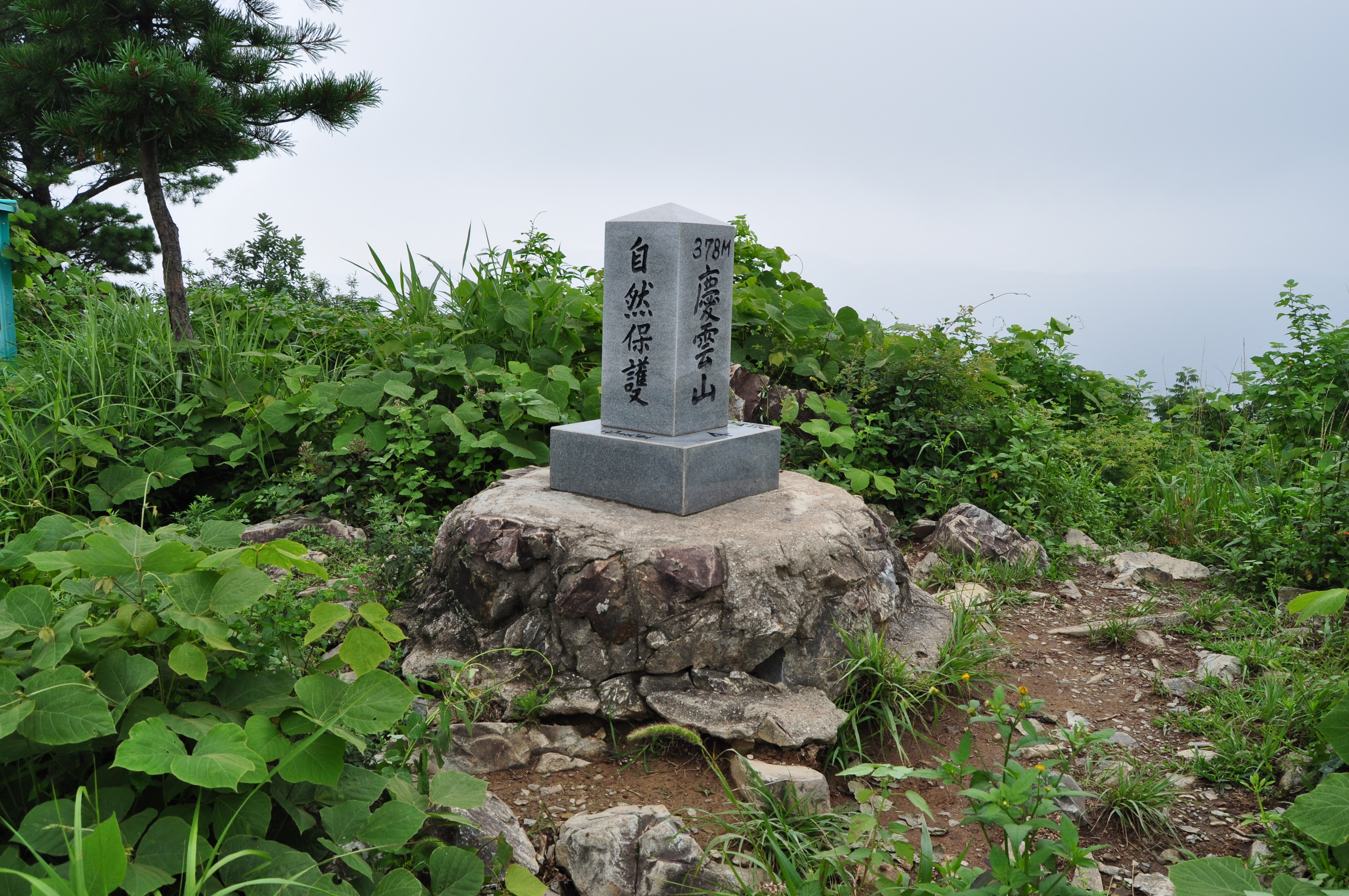 경상남도 김해시 소재, 경운산 (慶雲山) 정상 (해발 378미터)